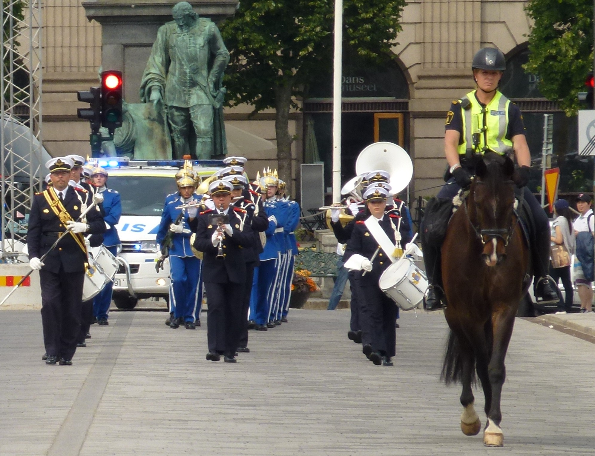 Beriden Polis framför Högvakten på Norrbro